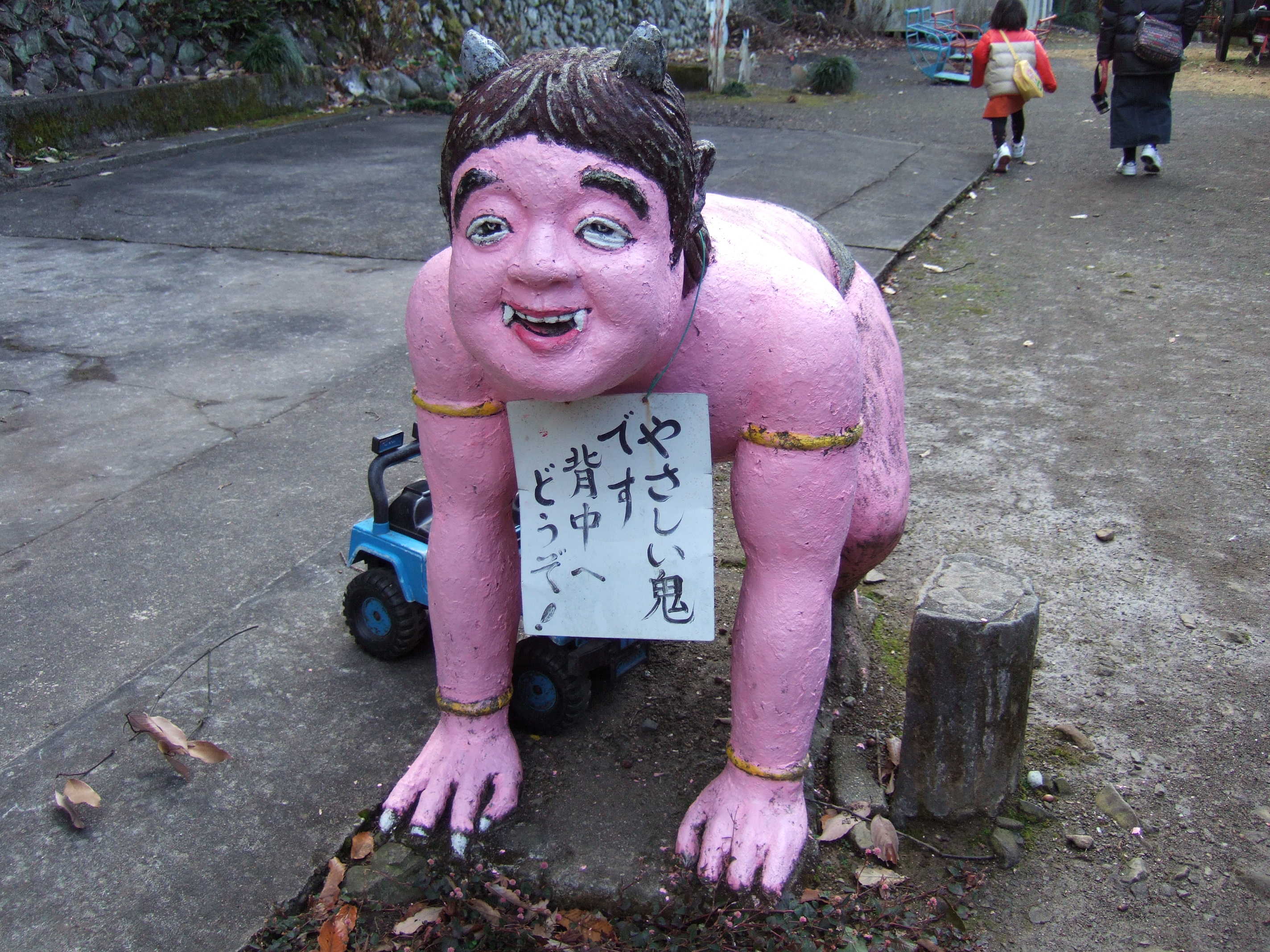 やさしい鬼です背中へどうぞ